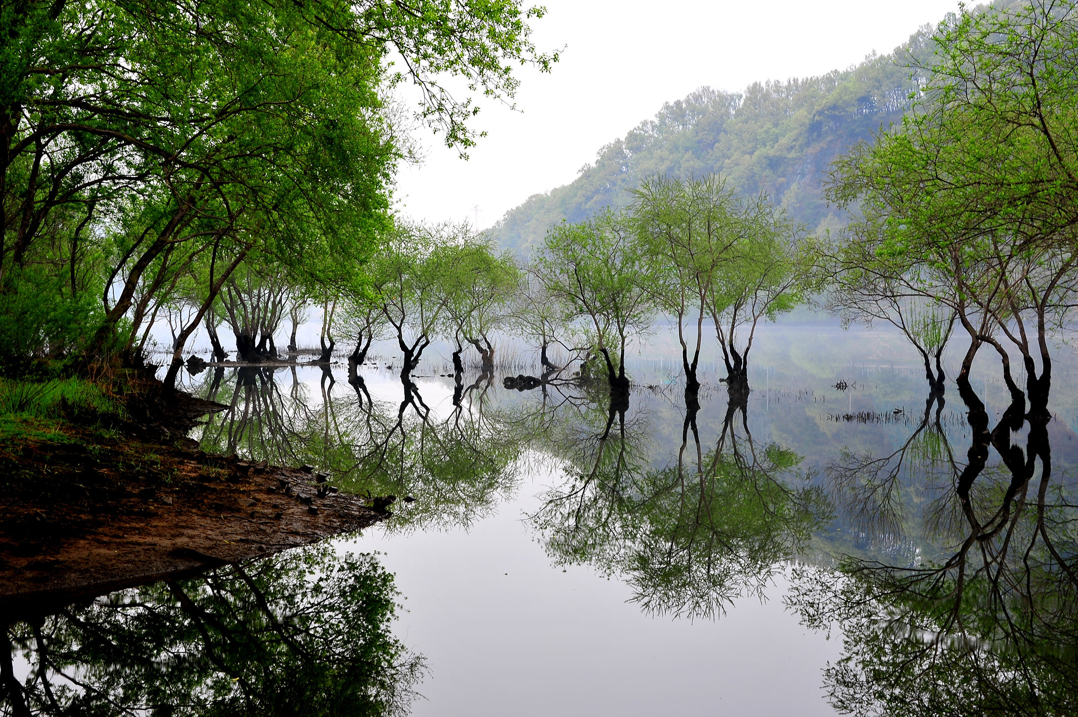 대청호오백리길 21구간_3